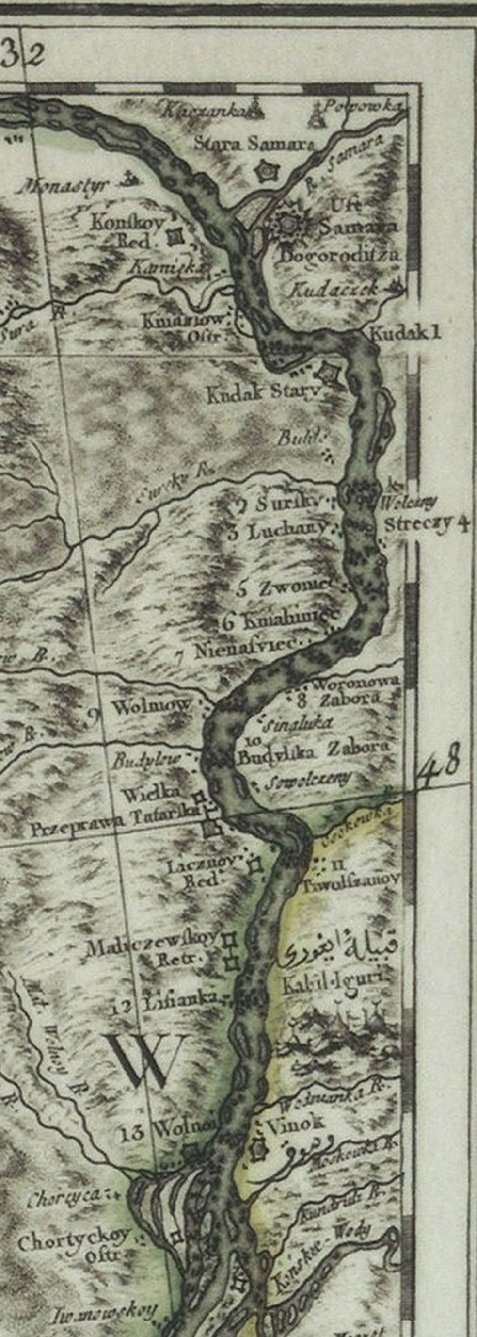 Дніпровське Надпорожжя на «Картi кордонiв Польшi…» з Атласу Речi Посполитої авторства Джованнi Антонiо Рiчi Занонi, 1772 р.